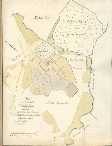 Scan from Johann Christoph Brotze's book Sammlung verschiedner Liefländischer Monumente. Plan der Kreisstadt Weissenstein ... [1739].